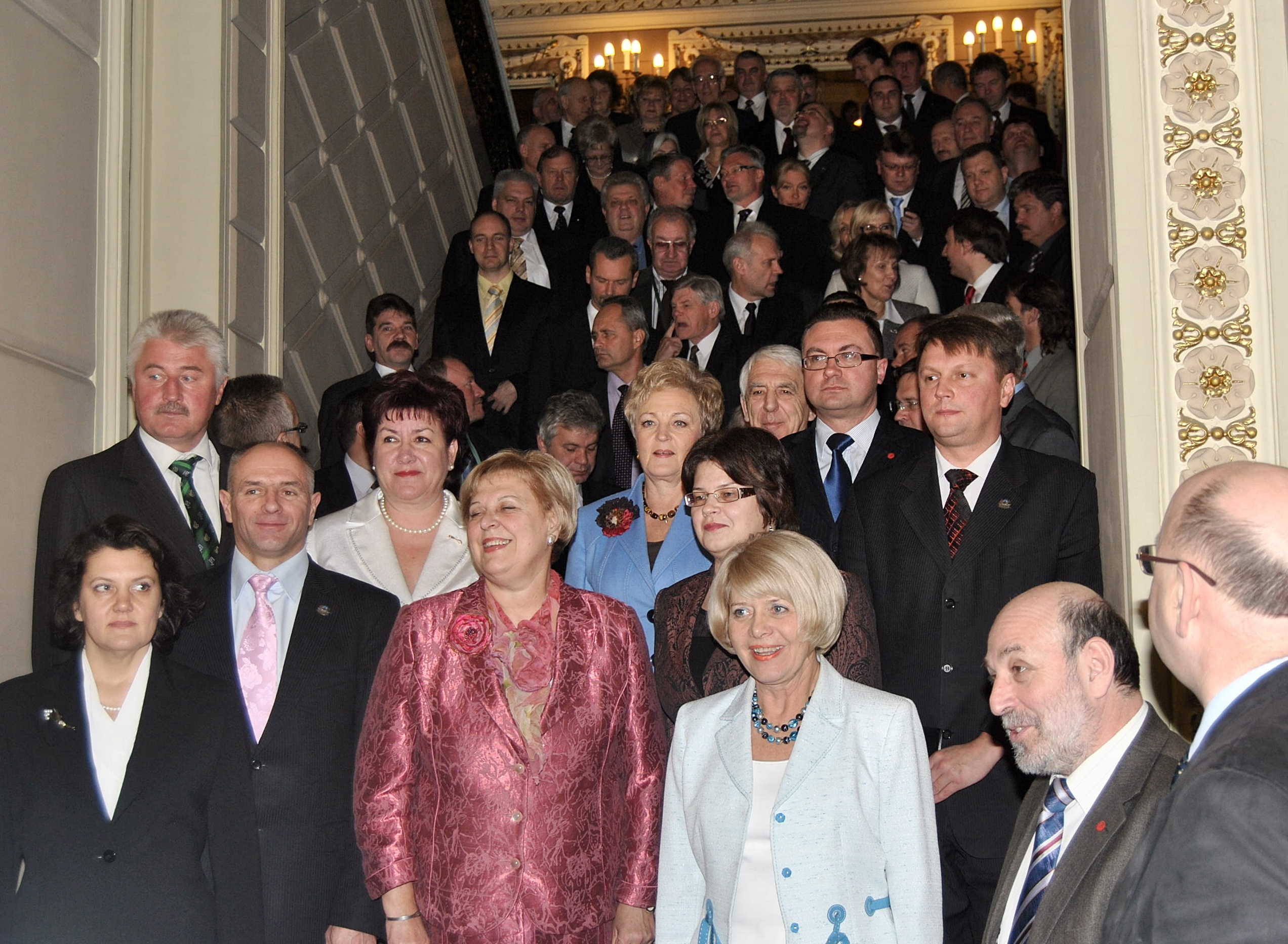 2010.gada 28.oktobris. 9.Saeimas deputātu kopīgā fotografēšanās uz Saeimas nama Lielajām kāpnēm. Foto: Saeima